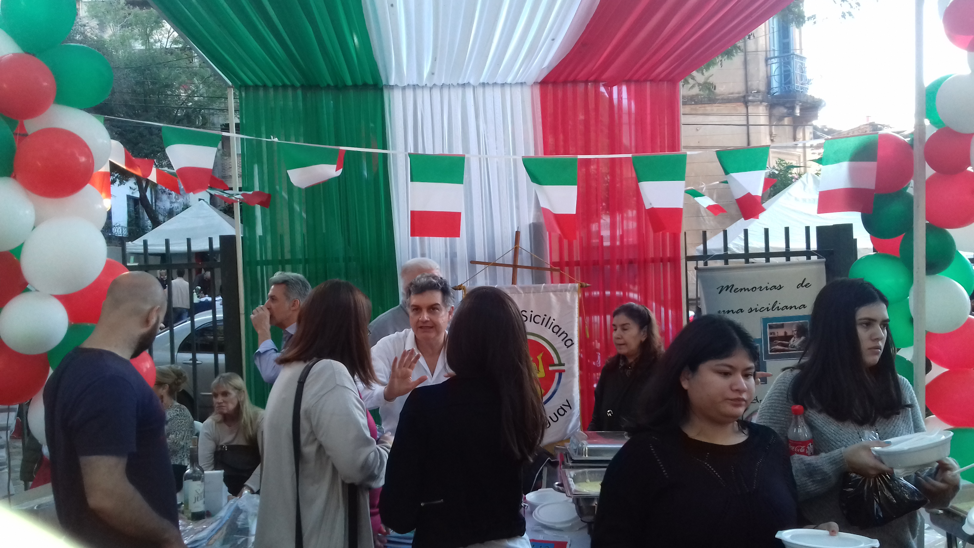 Fotografía obtenida durante la 3° edición de la Fiesta Italiana en Asunción, Paraguay (2019).